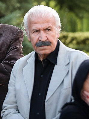 جواد پزشکیان ۲۲ شهريور ۱۳۹۷